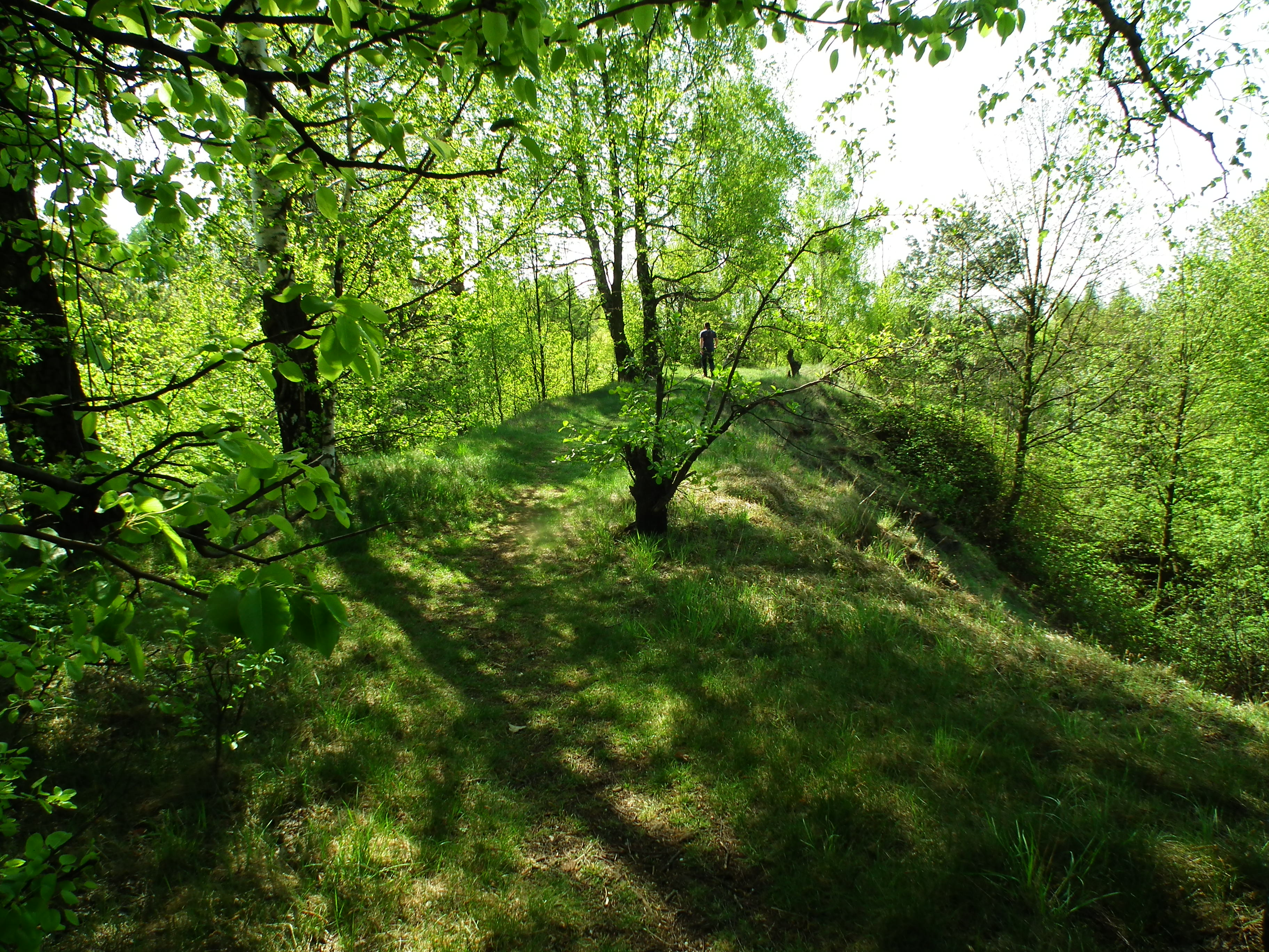 Suchogorski Labirynt Skalny w Bytomiu-Suchej Górze.